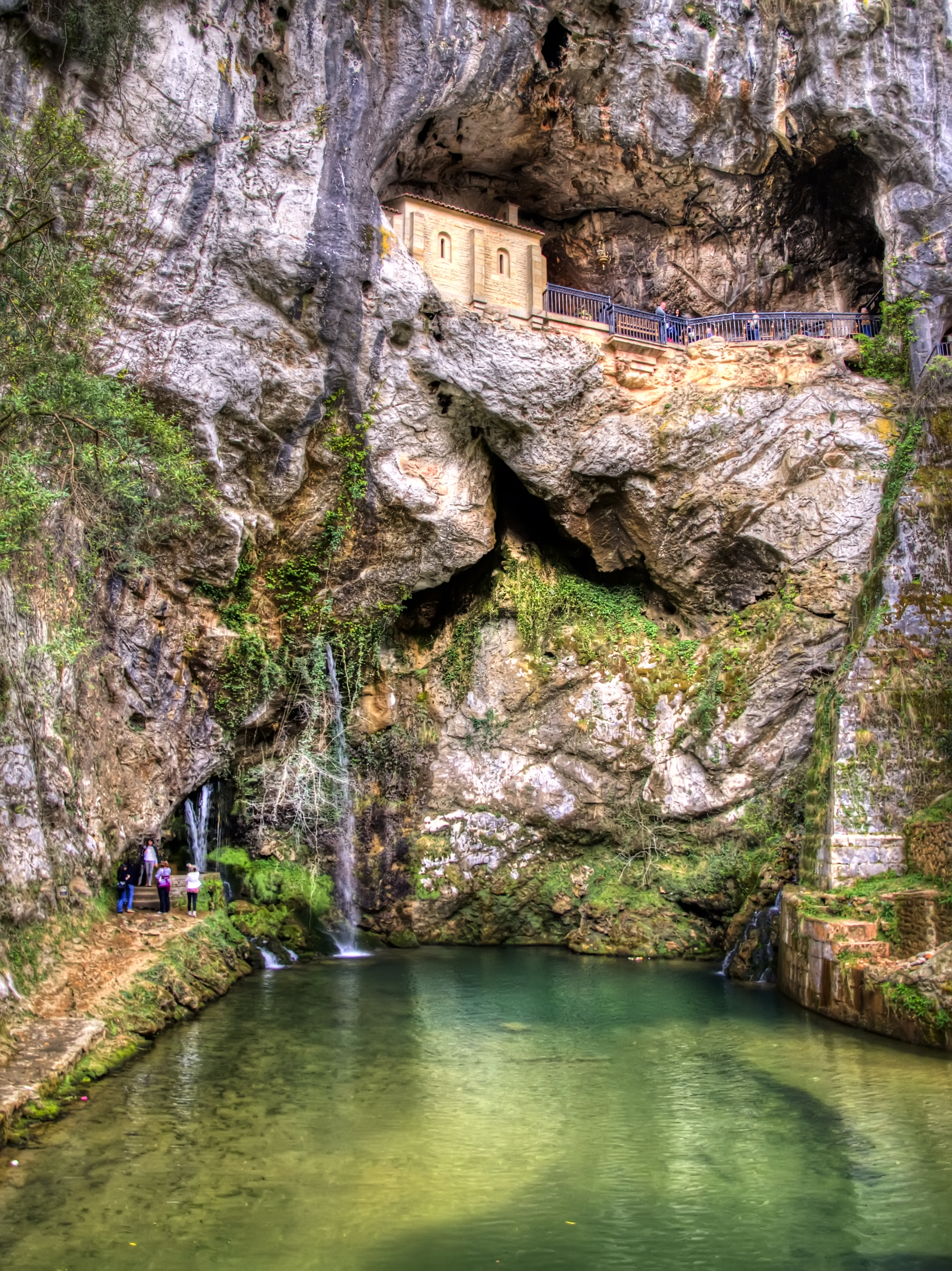 Covadonga_1_1